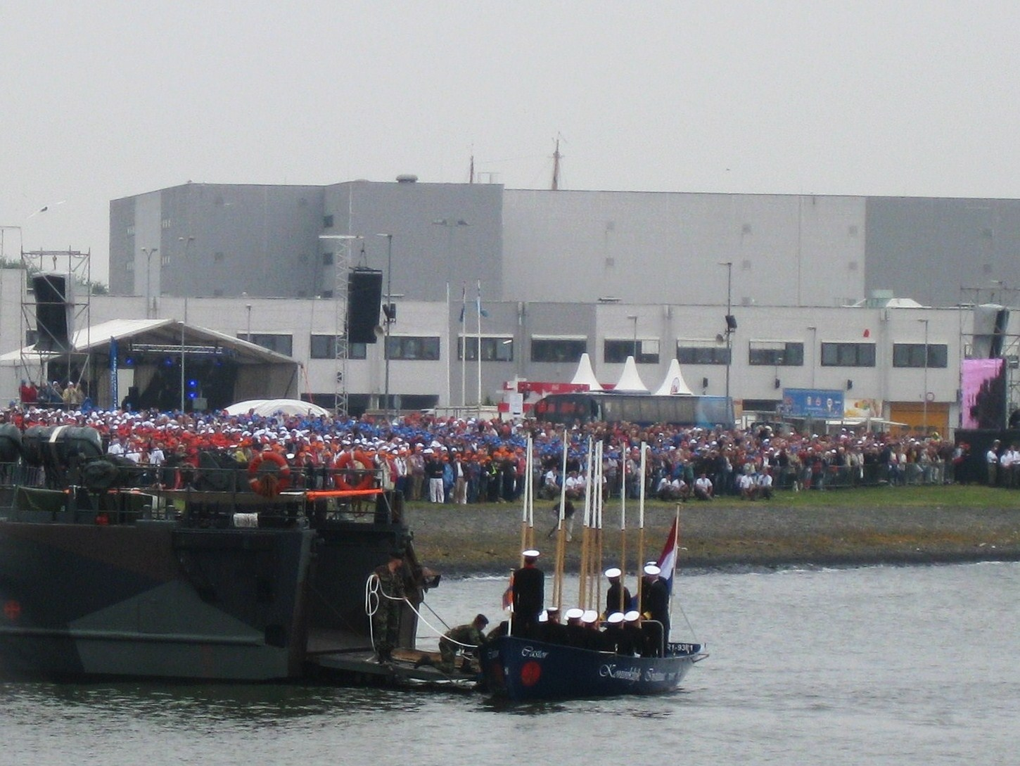 Saamhorigheidsdag voor Marinepersoneel tijdens de Marinedagen 2013 in Den Helder. Aankomst Viceadmiraal Matthieu Borsboom.